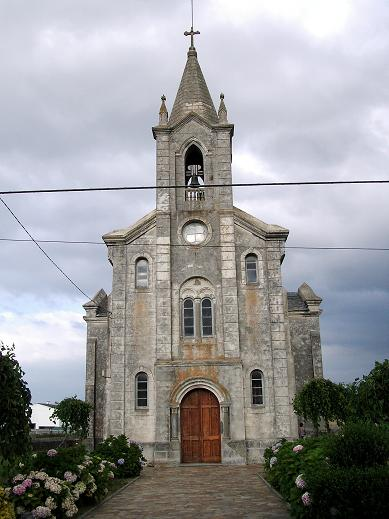 Igrexa de Rinlo. Tomada por user:Agremon o 24/07/05 Categoría:Imaxes de igrexas de Ribadeo Categoría:Imaxes de Rinlo